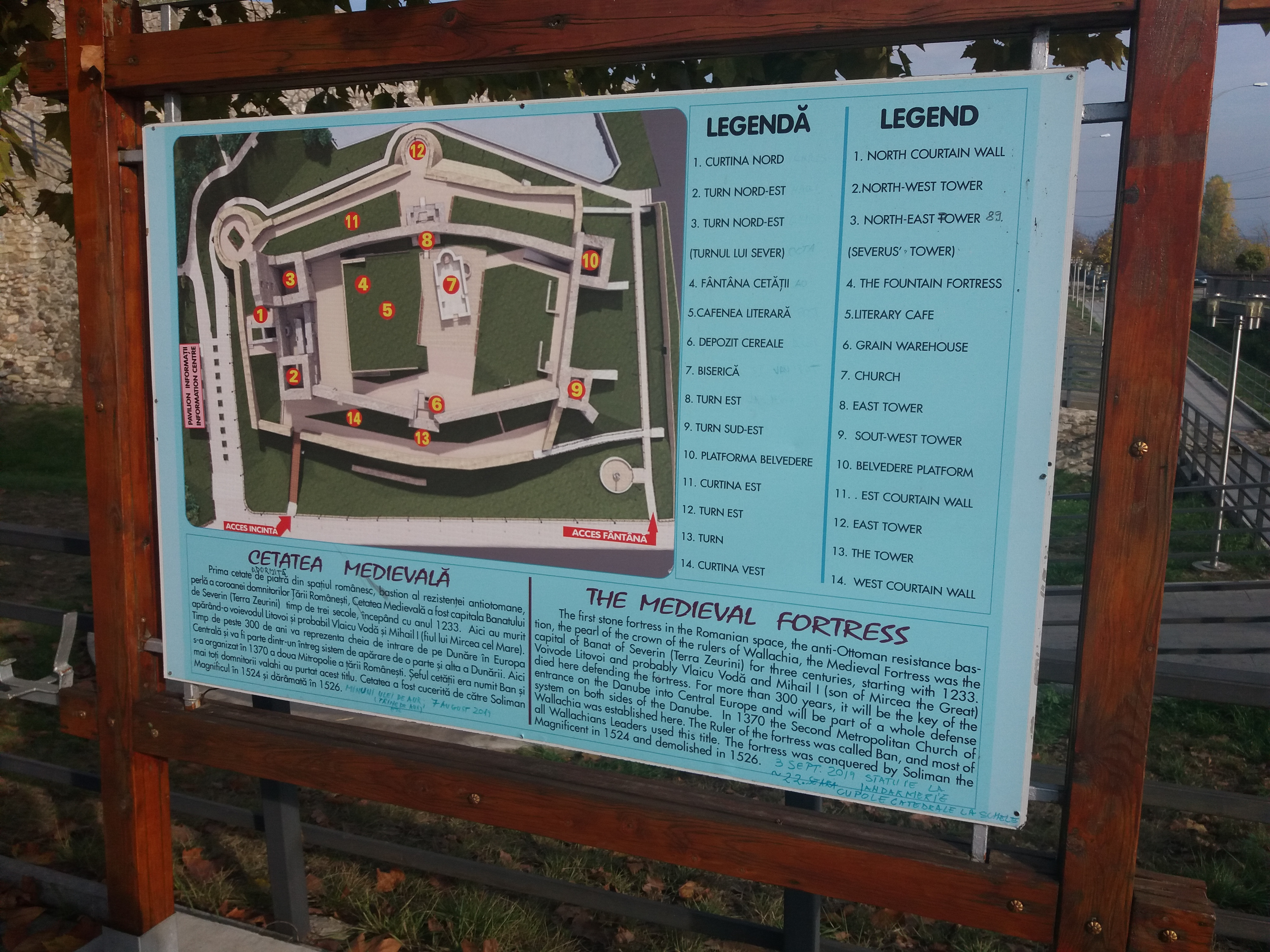 Ruinele Cetății Severinului este un ansamblu de monumente istorice aflat pe teritoriul municipiului Drobeta Turnu Severin.